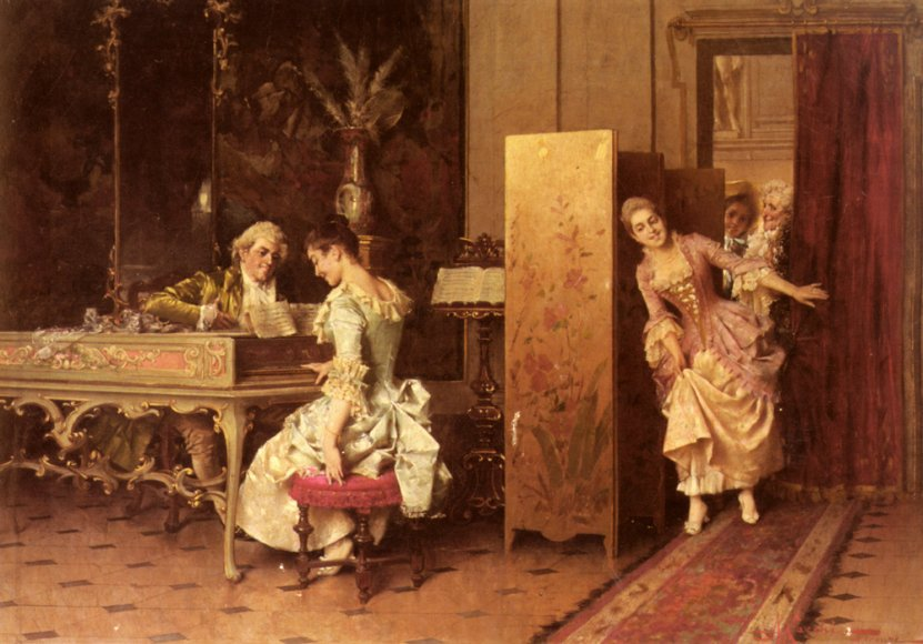 Rococo scene